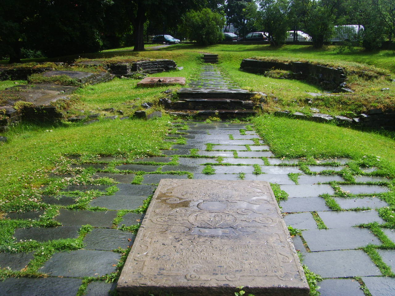 Ruinparken, Gamlebyen, Oslo, med ruiner av Hallvardskirken.